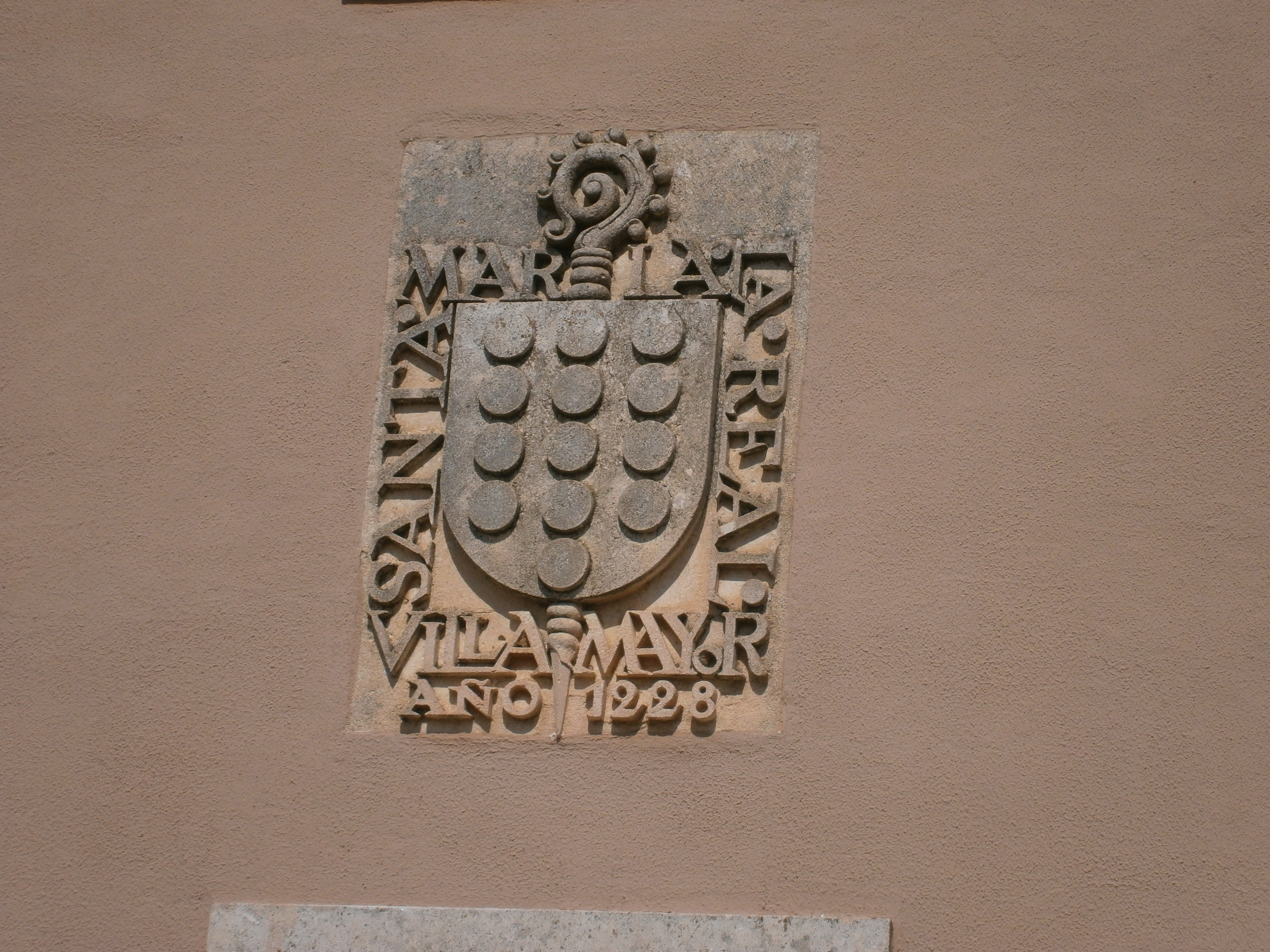 Escudo en la entrada del Monasterio de Santa María la Real en Villamayor de los Montes